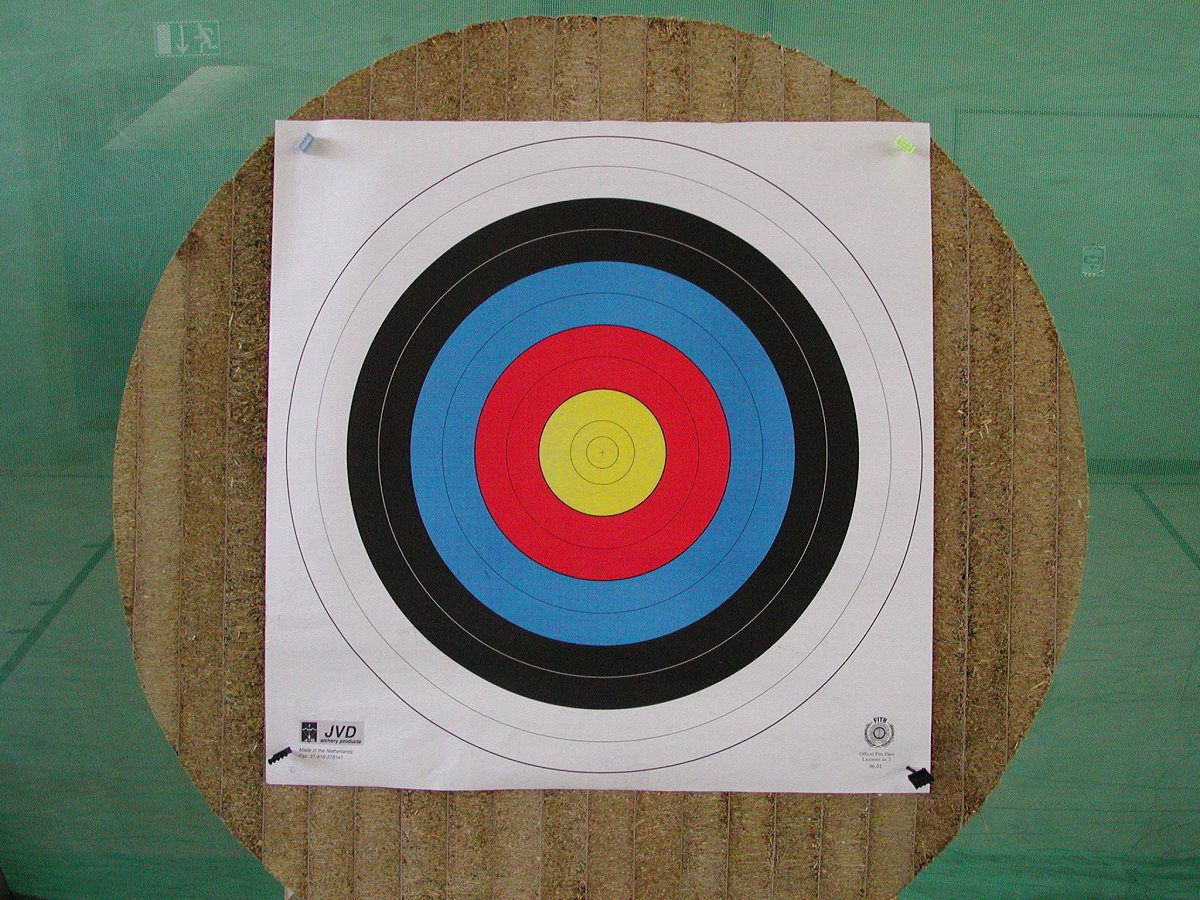 Bogenscheibe / Scheibe für das Bogenschießen